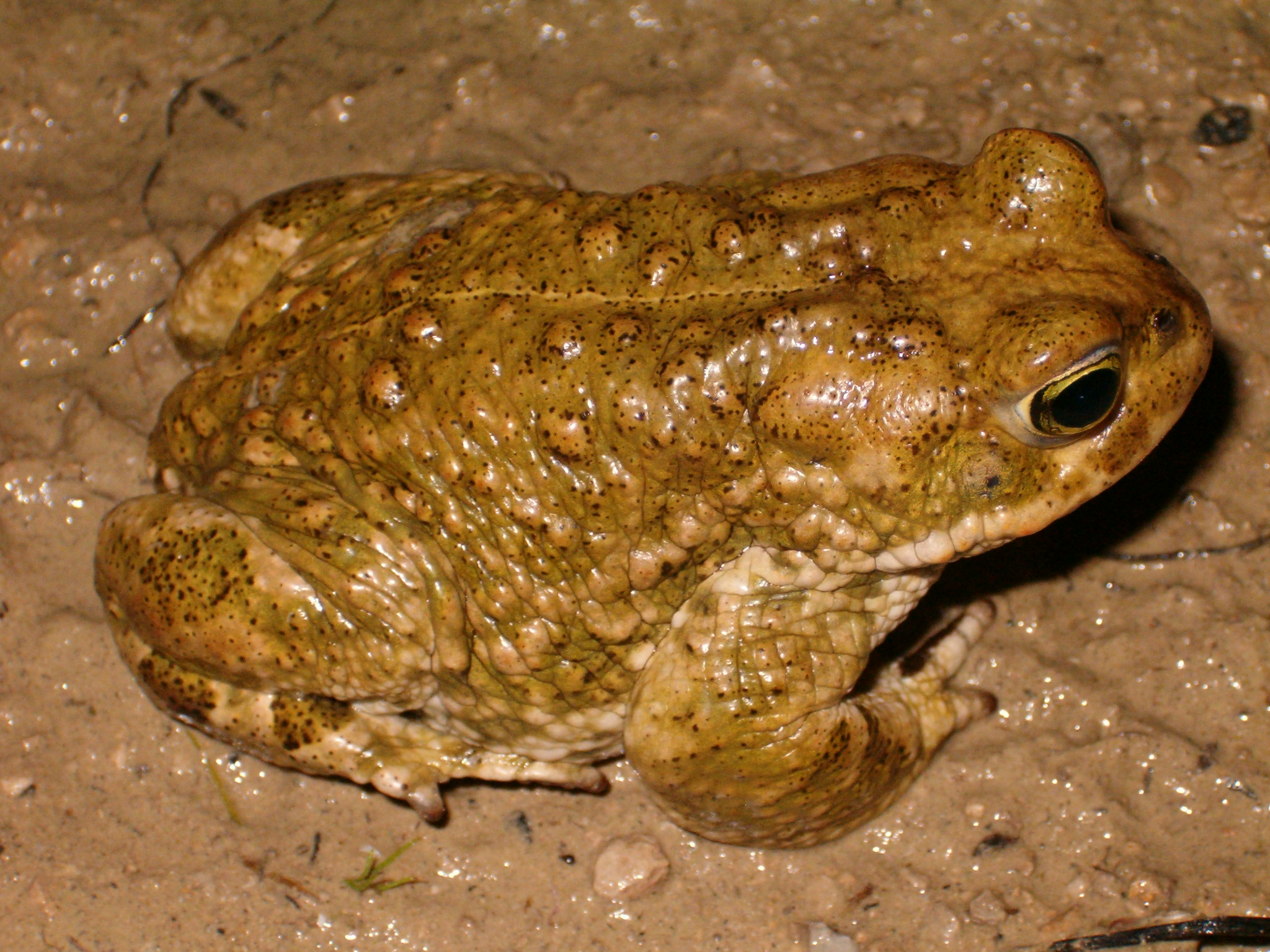 Bufo calamita 24 March 2006 - 23h30 Notre-Dame-de-Londres - Hérault - France By David Delon